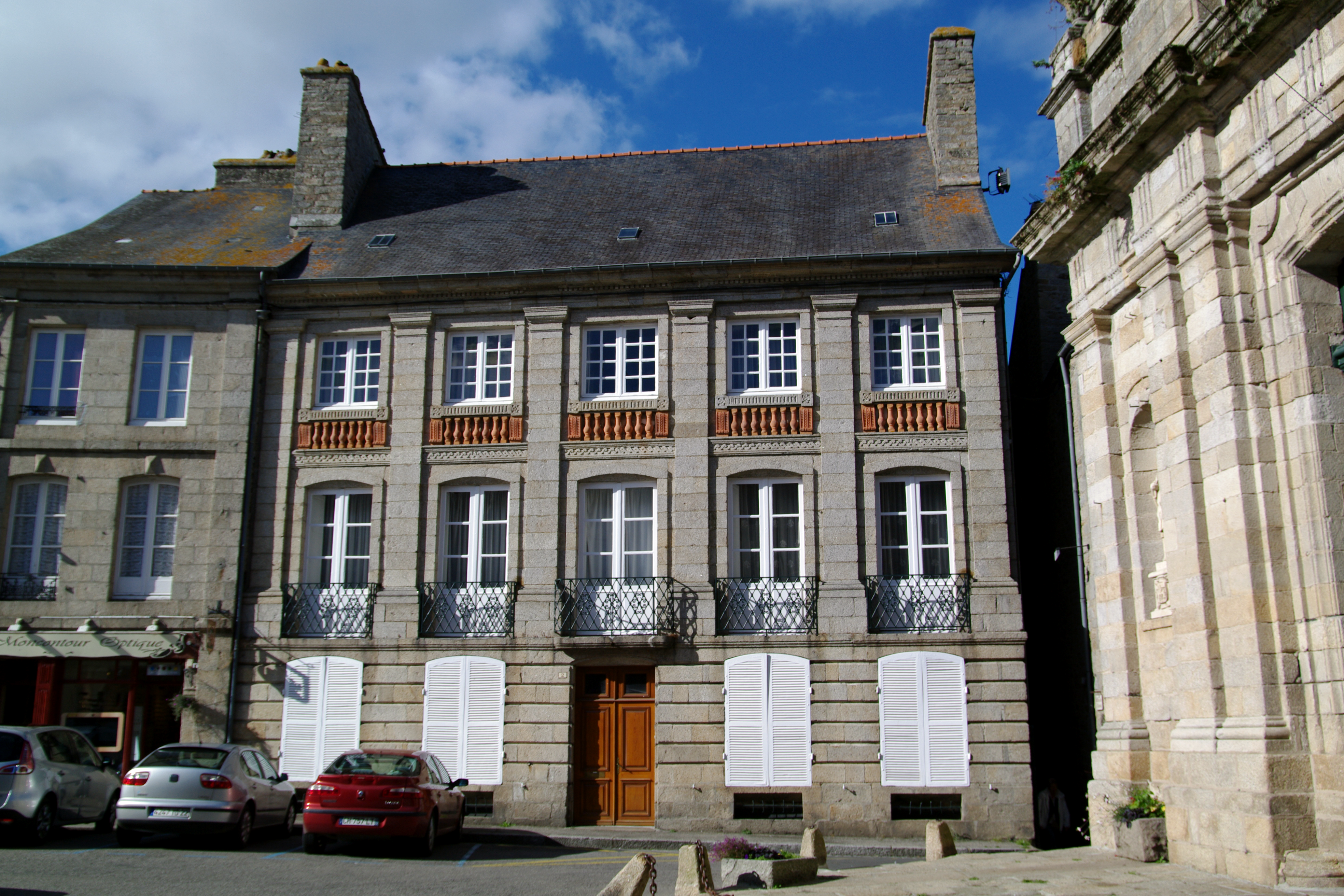 Hôtel de Clézieux, Penthièvre (place) 2 (Inscription, 1969) .